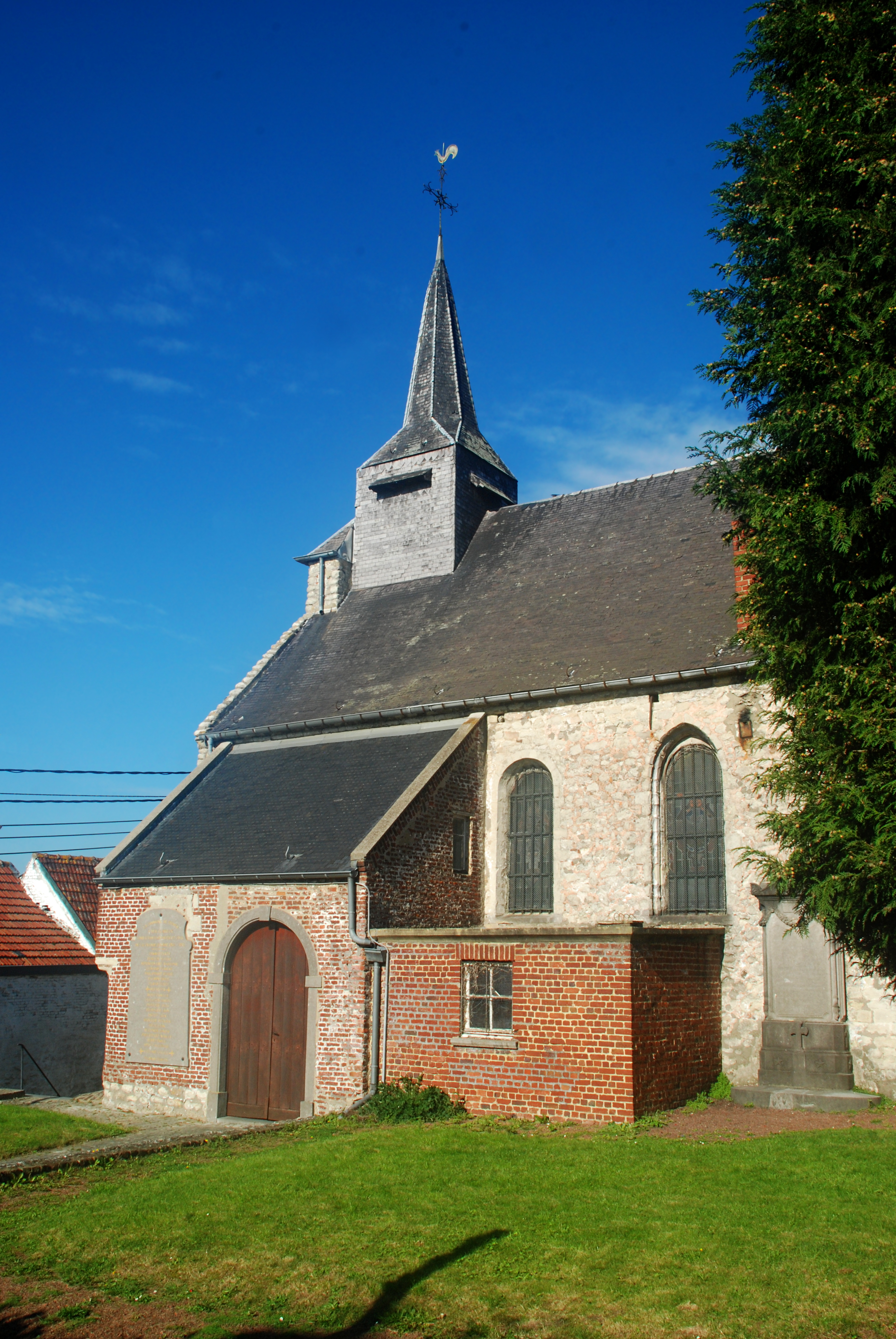 Belgique - Brabant wallon - Nivelles - Eglise Sainte-Marguerite de Thines